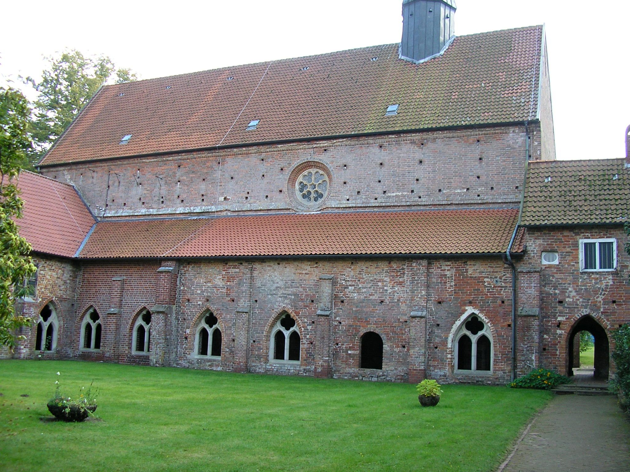 Stift Börstel